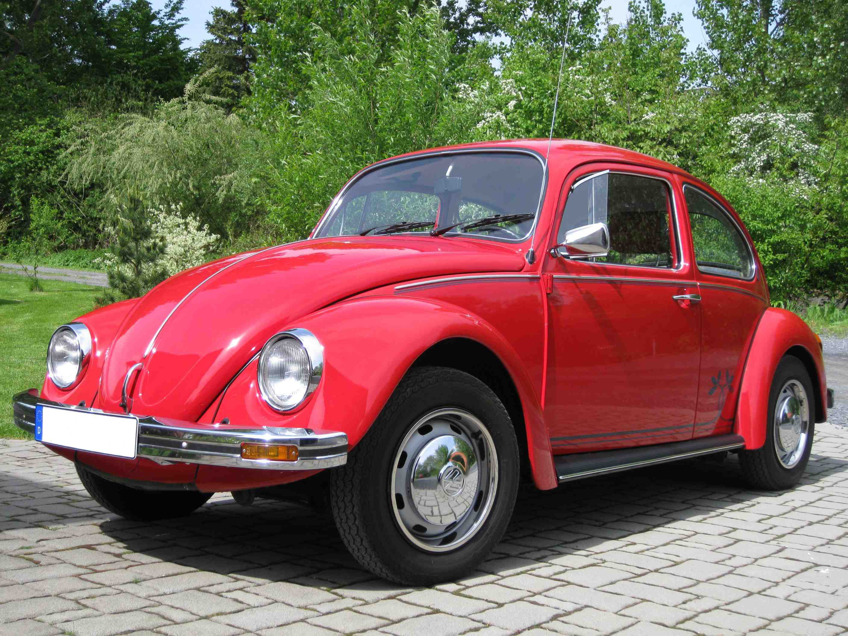 Der Samtrote Sonderkäfer, VW Käfer Sondermodell von 1984